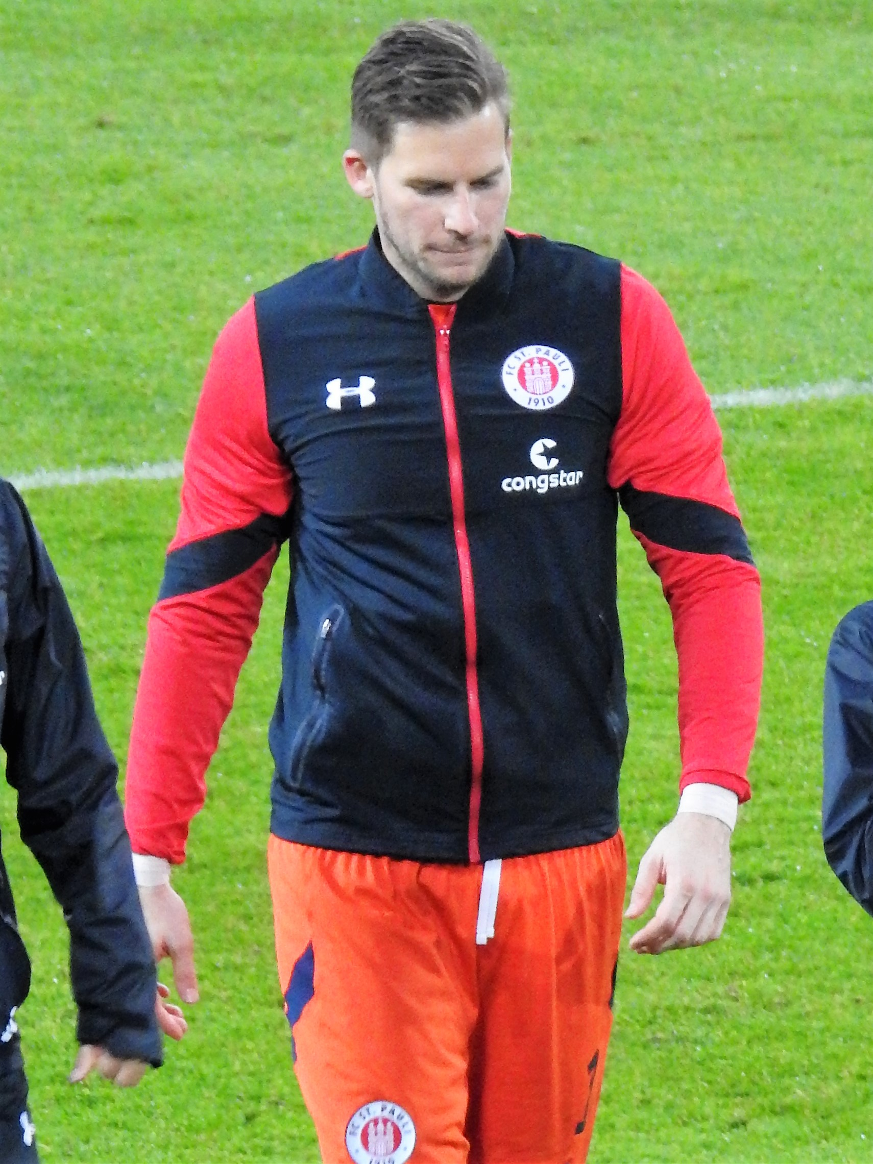 Philipp Heerwagen im Trikot vom FC St.Pauli